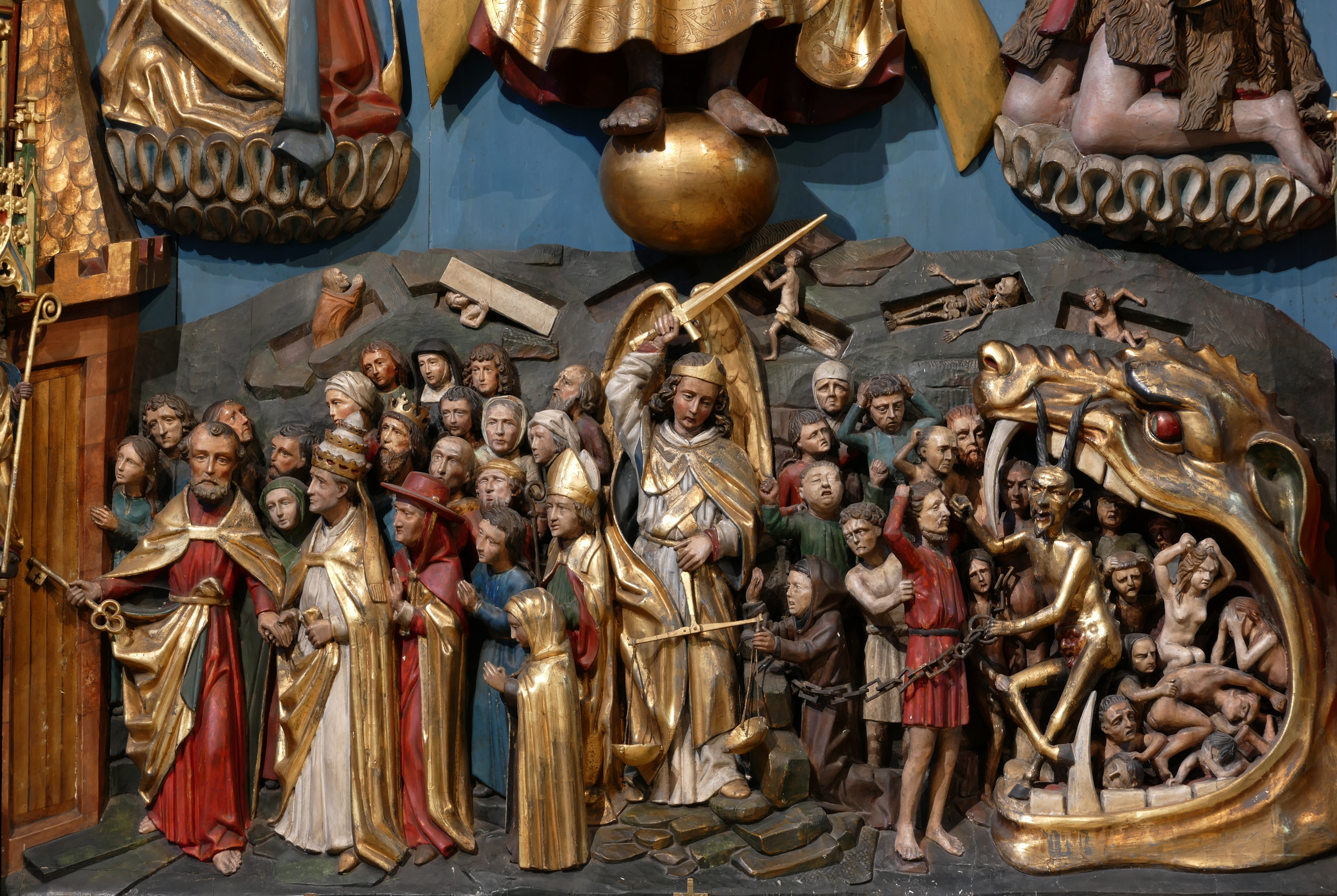 Alsace, Bas-Rhin, Église Saint-Georges de Haguenau (PA00084724, IA00061901). Retable "Jugement dernier" (Veit WAGNER, 1496): Saint Michel pesant les âmes, élus et damnés. This object is classé Monument Historique in the base Palissy, database of the French furniture patrimony of the French ministry of culture, under the references PM67000542 and IM67002088.